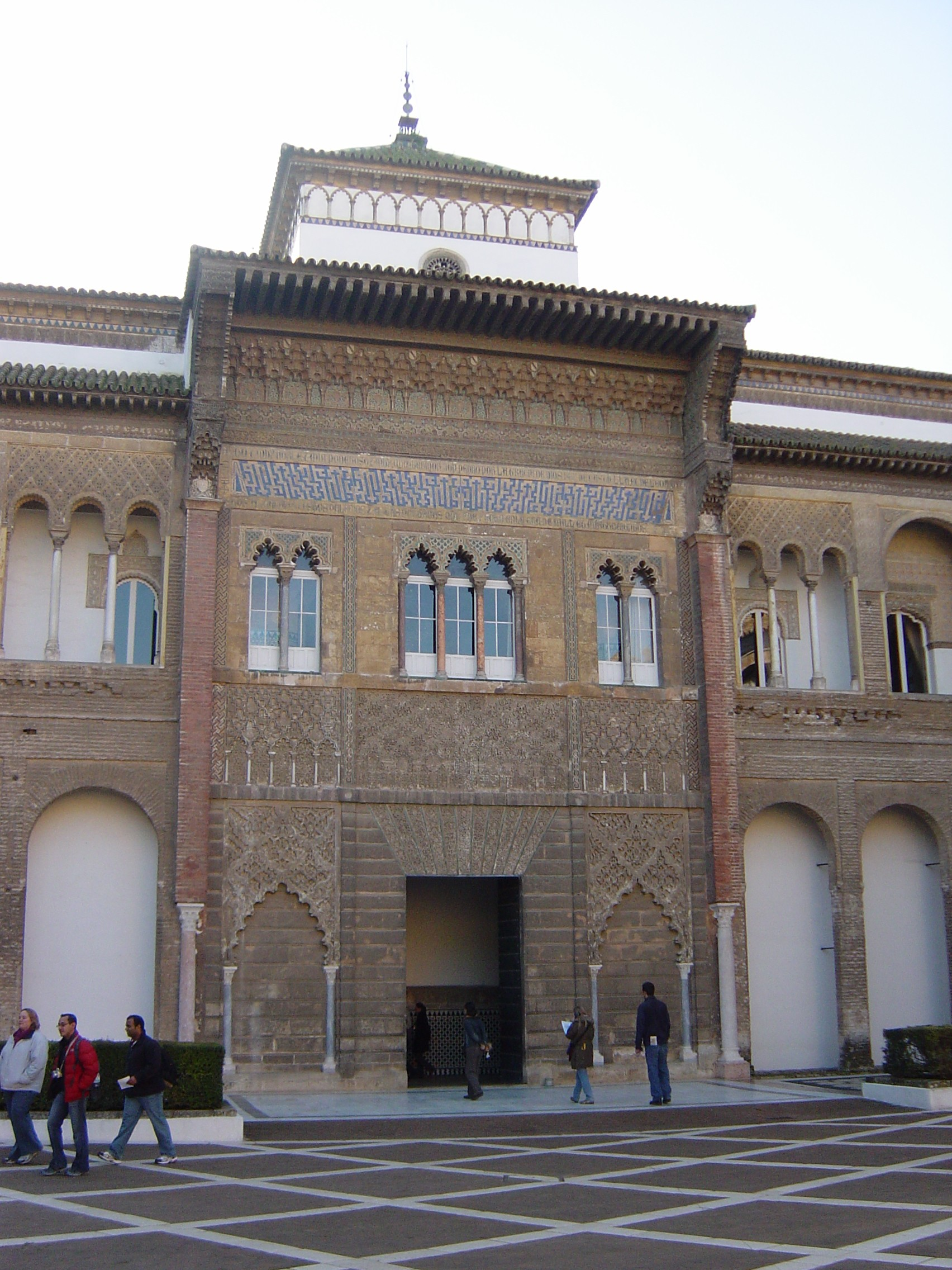 アルカサル、セビーリャ、スペイン